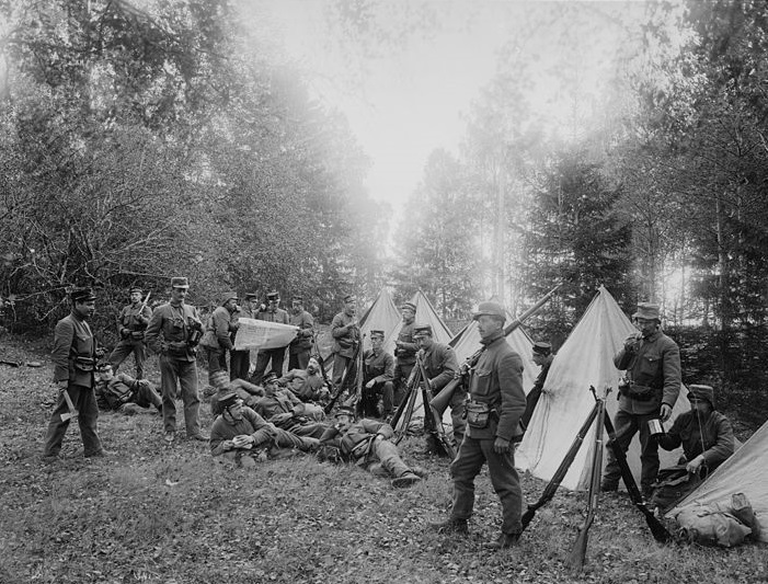 Bildet er hentet fra Nasjonalbibliotekets bildesamling. Anmerkninger til bildet var: Påskrift arkivark: Grænsevagten Eldste arkivnummer: 641 d Yngre arkivnummer: 85, 437